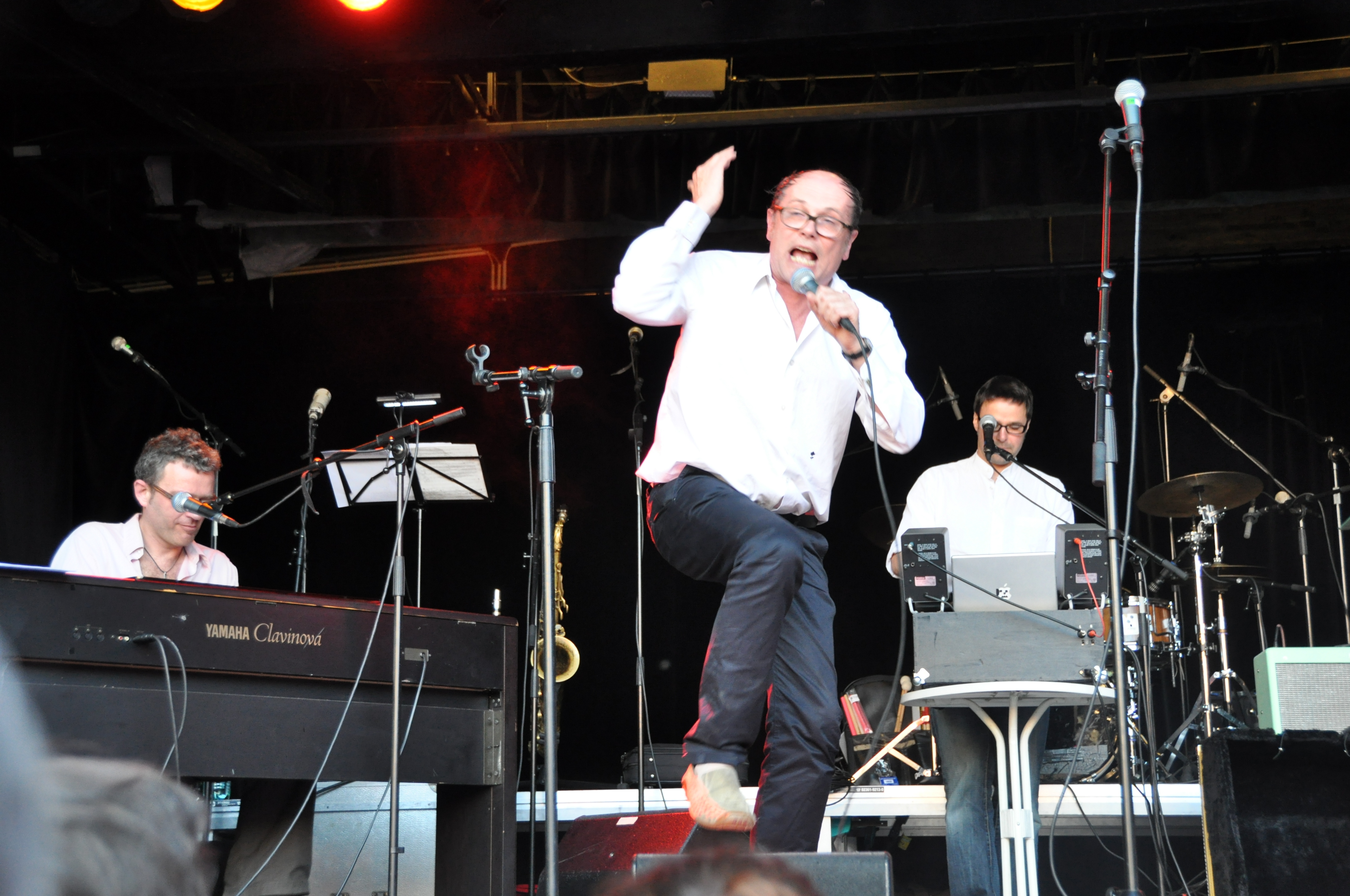 Pigor & Eichhorn am Trost und Rat Sommerfest auf der Tschauner-Bühne in Wien